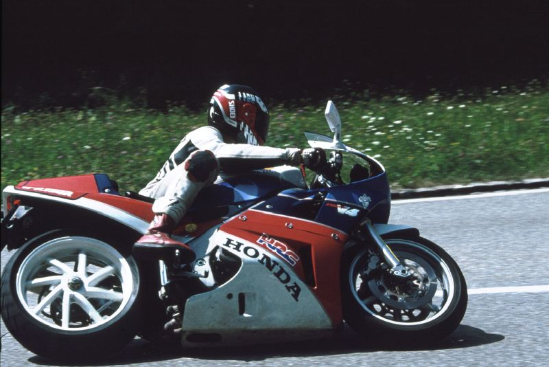 Honda VFR750R (RC30)